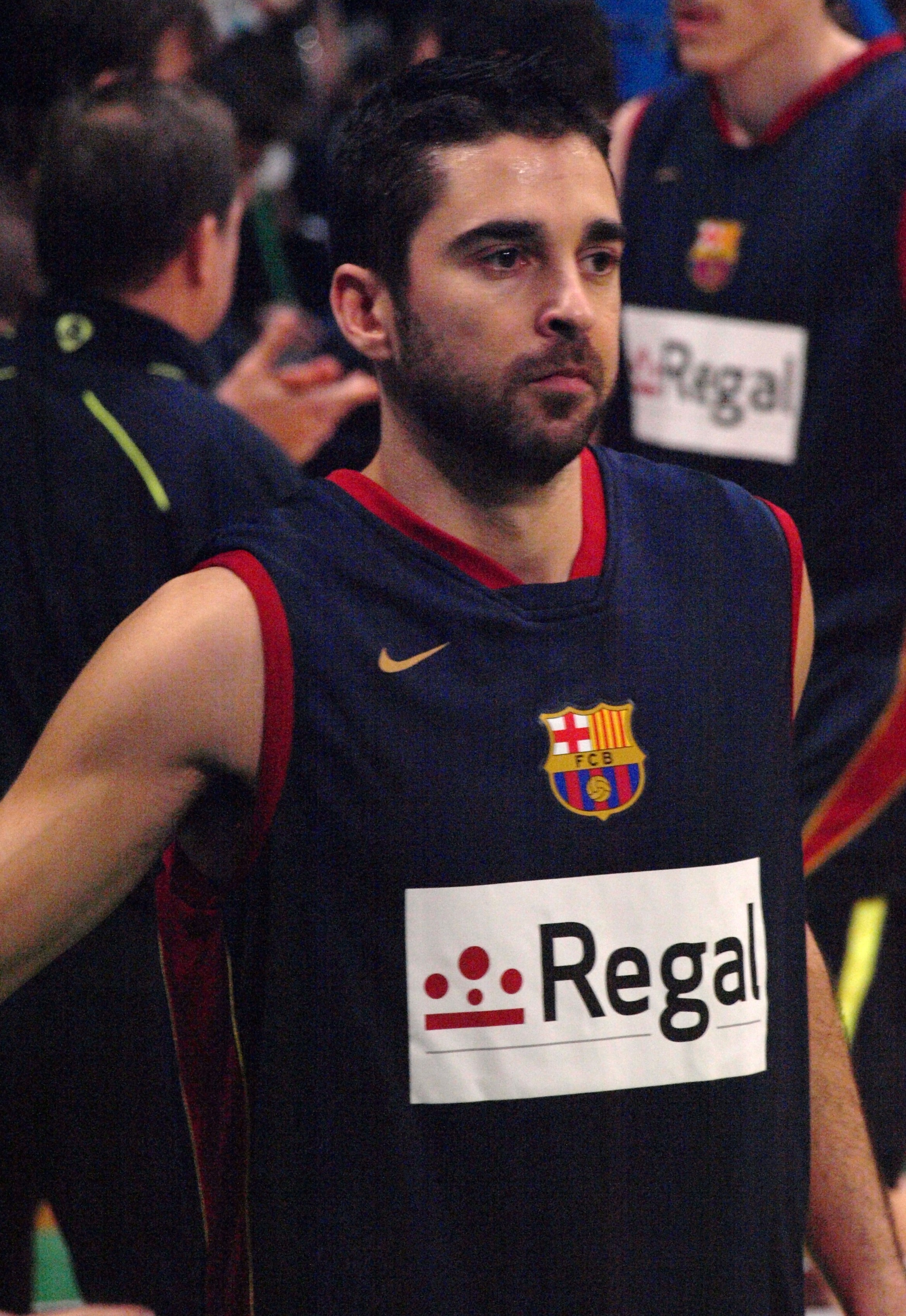 Juan Carlos Navarro, en el partido que enfrentó al FC Barcelona y al DKV Joventut de liga ACB en el Olímpico de Badalona en enero de 2009.